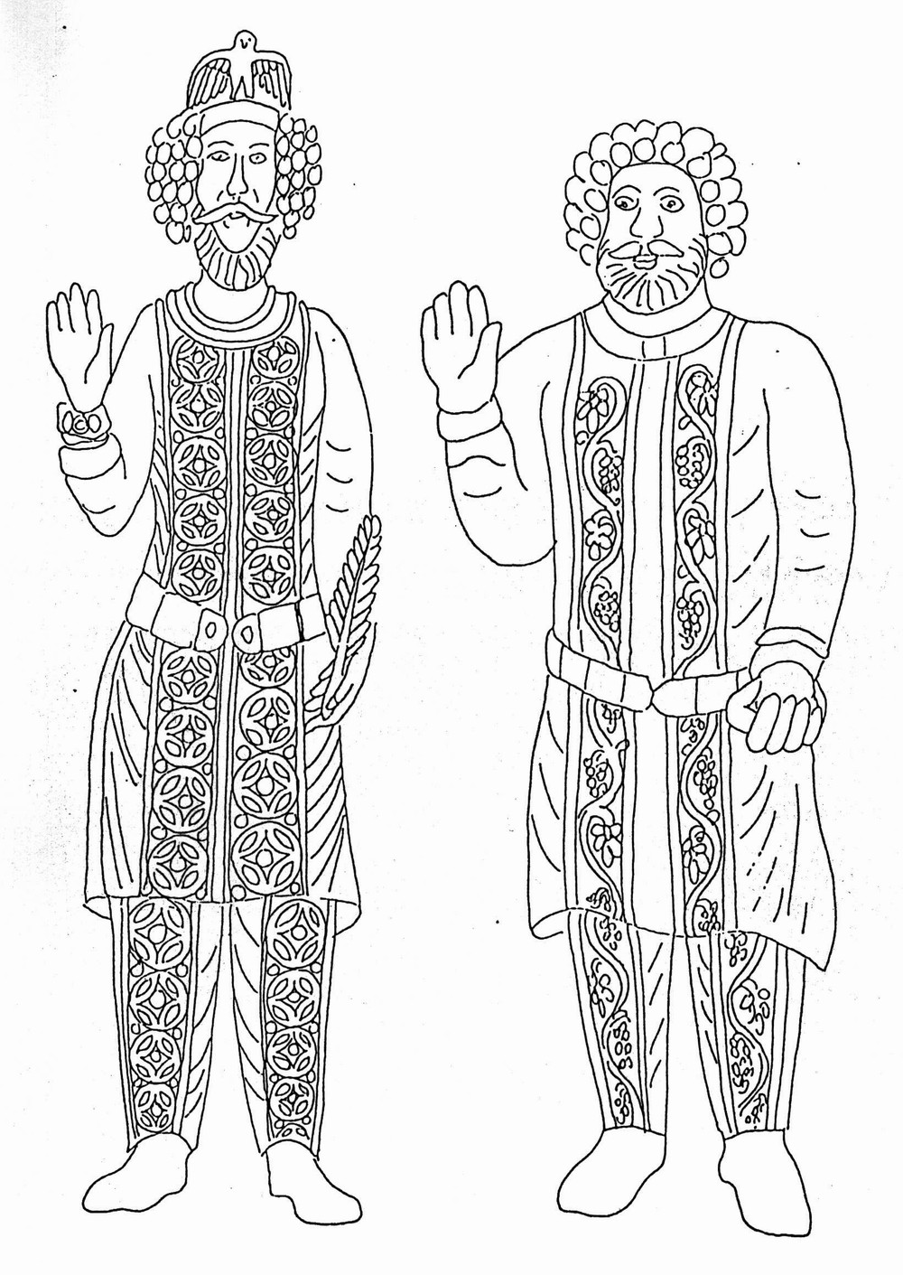 Két szobor rajza az ókori iráni pártus művészetből